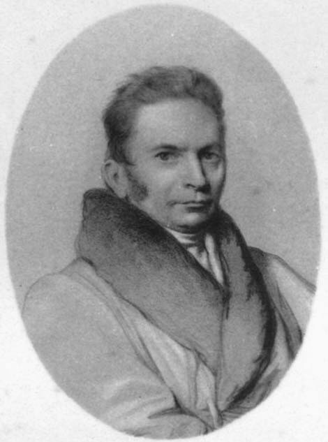 Porträtfotografie von Gottlieb Christian Eberhard von Etzel.